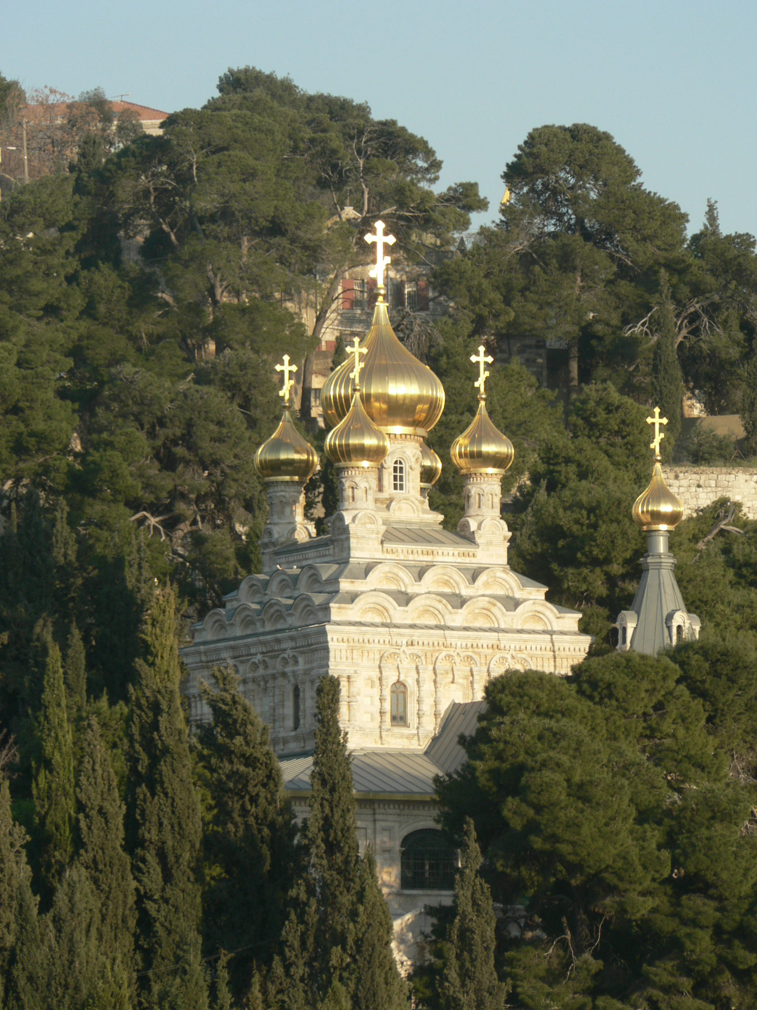 Eglise russe Sainte-Marie-Madeleine